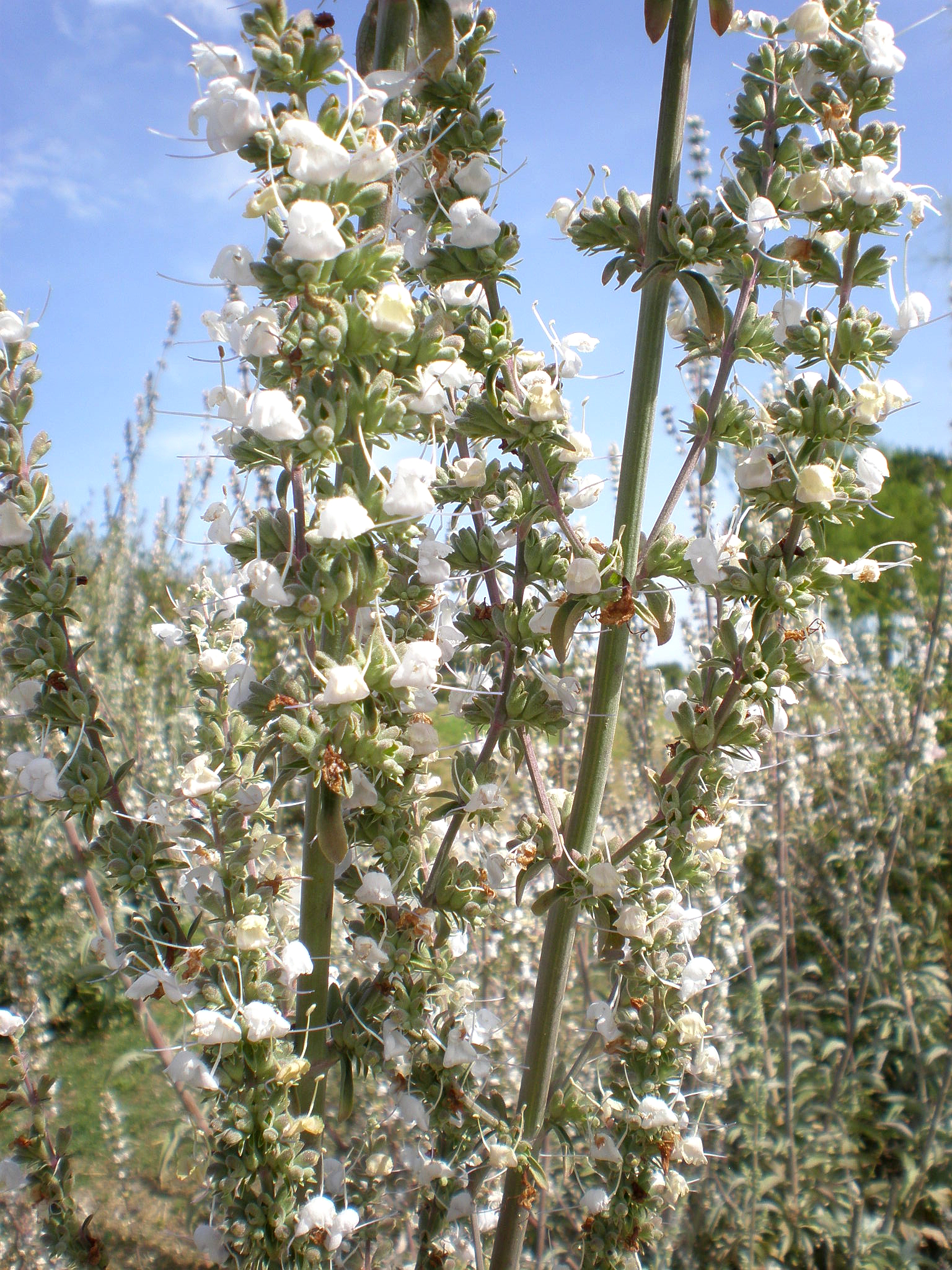 Jardín Botánico de Barcelona.